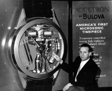 Max Hetzel alla presentazione Bulova